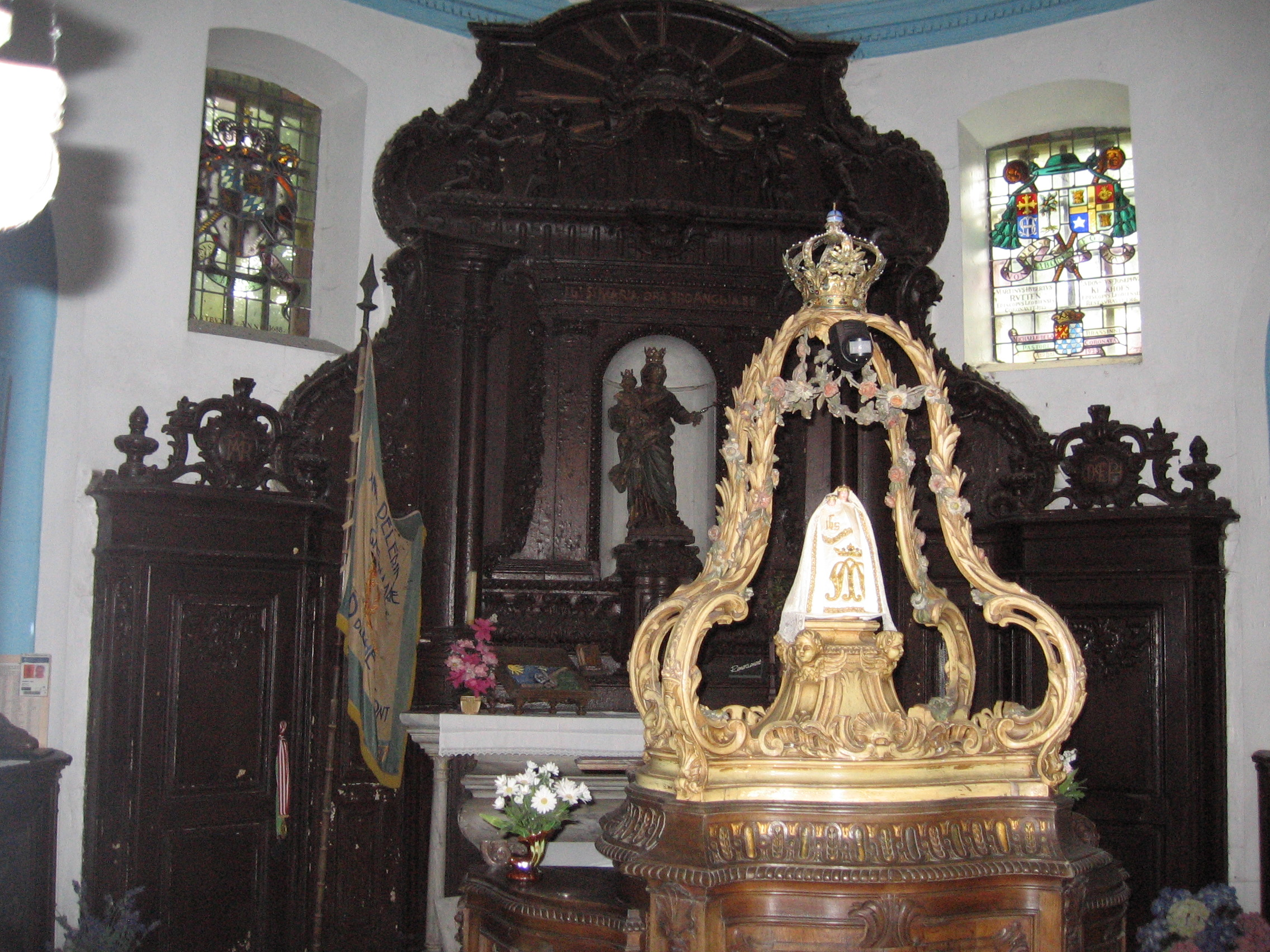 L'autel et retable de la chapelle des jesuites anglais de Chèvremont, avec inscription (au dessus de la statue mariale) de 16 S.Maria ora pro Anglia 88